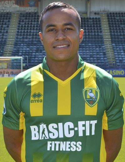 Roland Alberg